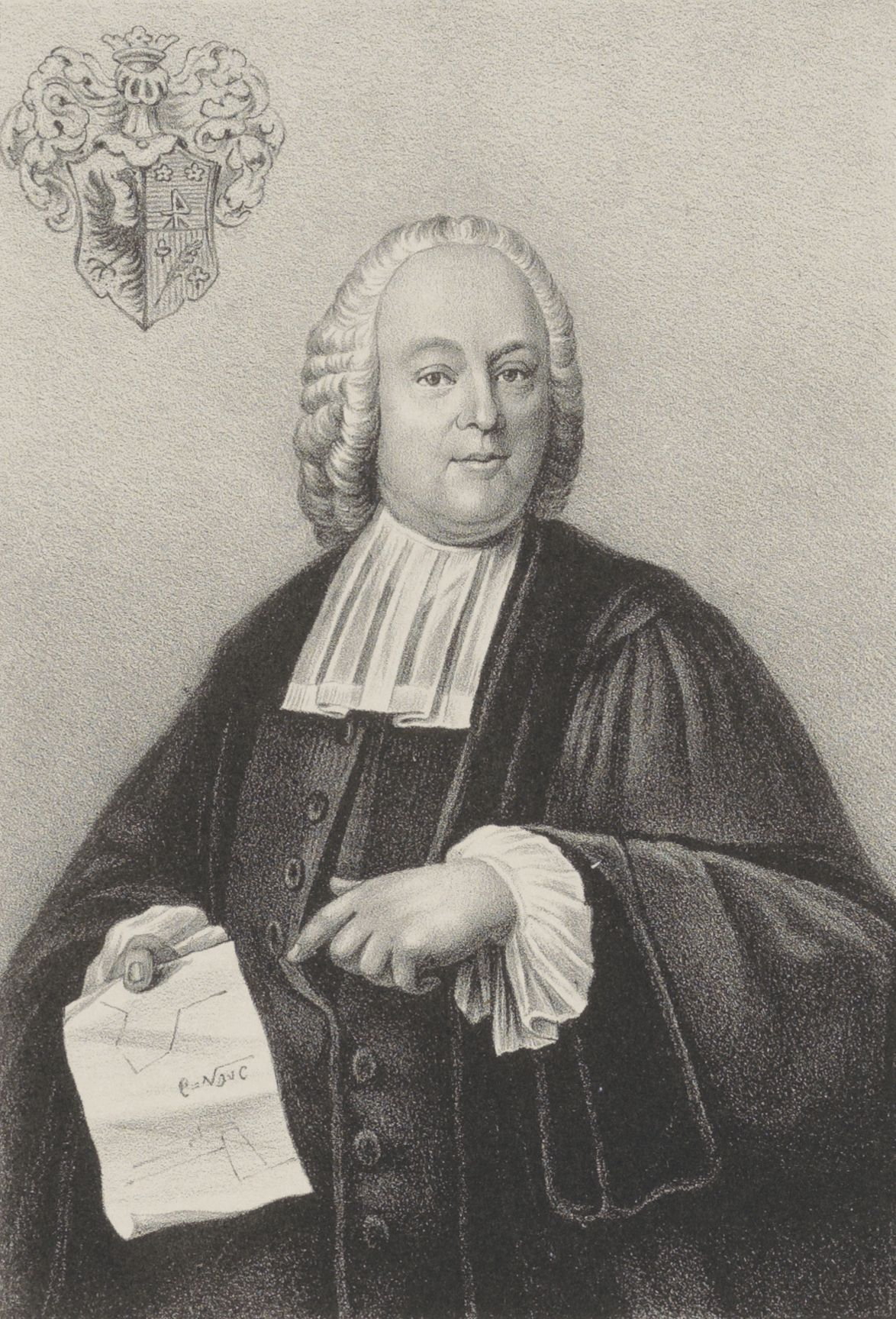 Portret fan Nicolaas Ypey (1714-1785), heechlearaar wis- en fêstingboukunde yn Frjentsjer.